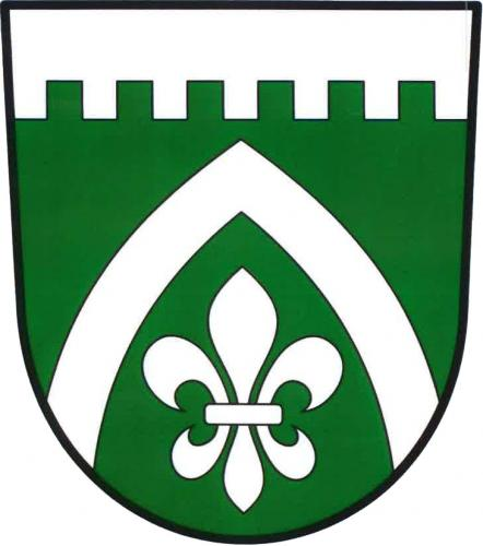 znak, Vyskeř, okres Semily